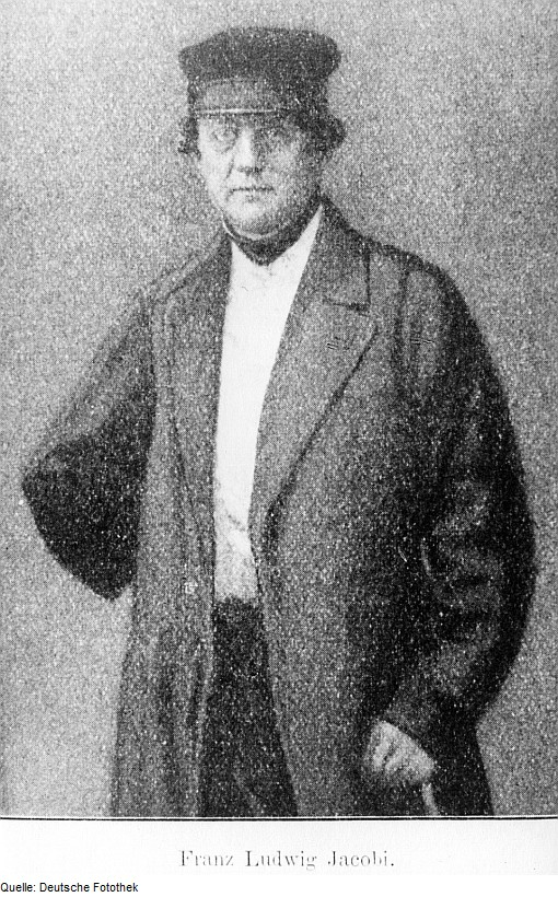 Original image description from the Deutsche Fotothek Meißen. Franz Ludwig Jacobi, einer der Begründer des Jacobiwerkes, aus: Mitteilungen des Vereins für Geschichte der Stadt Meißen, 9. Bd., 1916